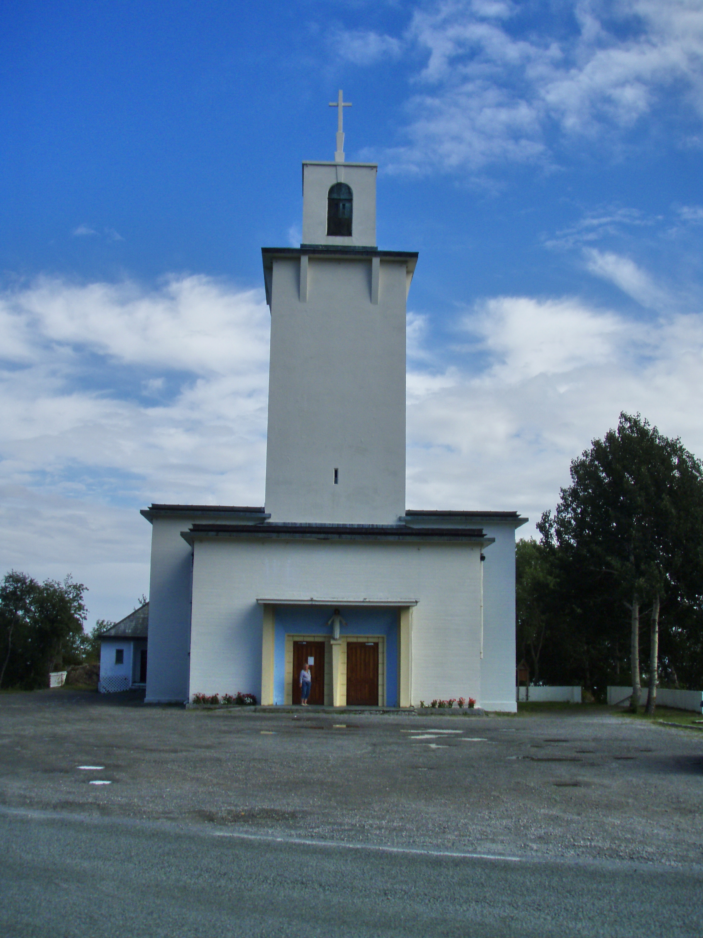 Stamsund church, Vestvågøy, Lofoten, Norway